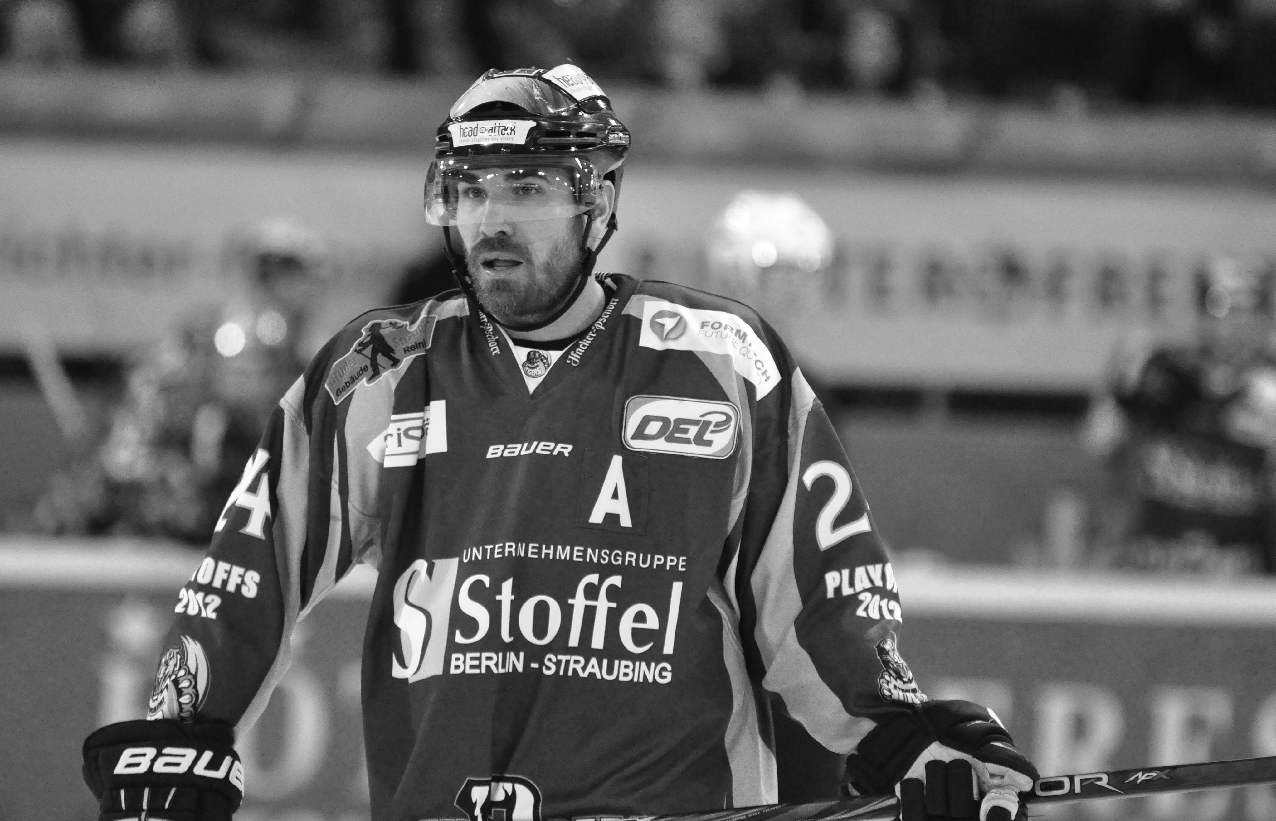 Straubing Tigers - Eisbären Berlin 07.04.2012 DEL PlayOff Halbfinale